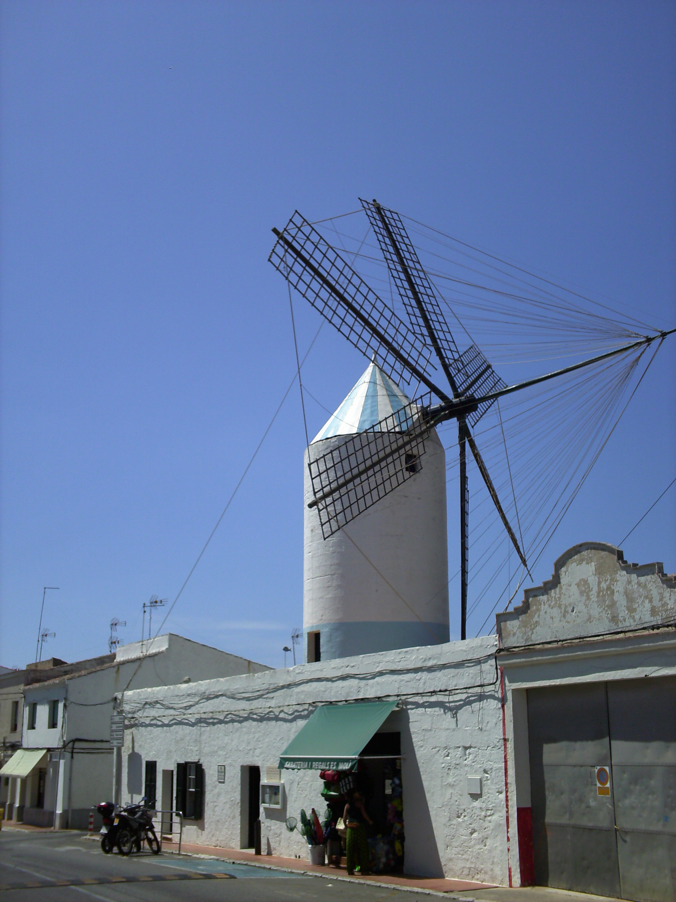 Vista